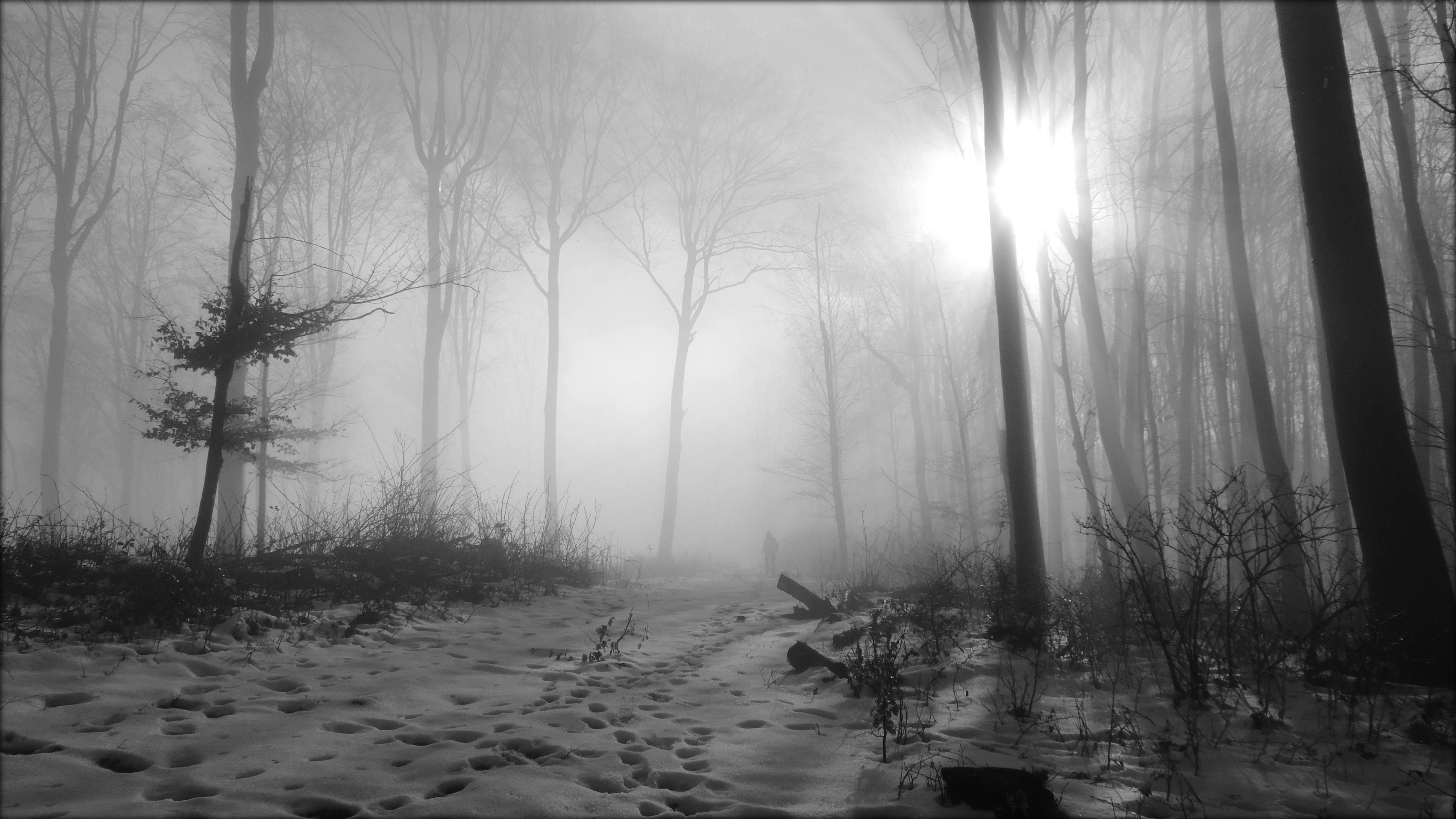 Papučka zora u zimsko doba This is a a photo of a natural area in Croatia with ID: PP06